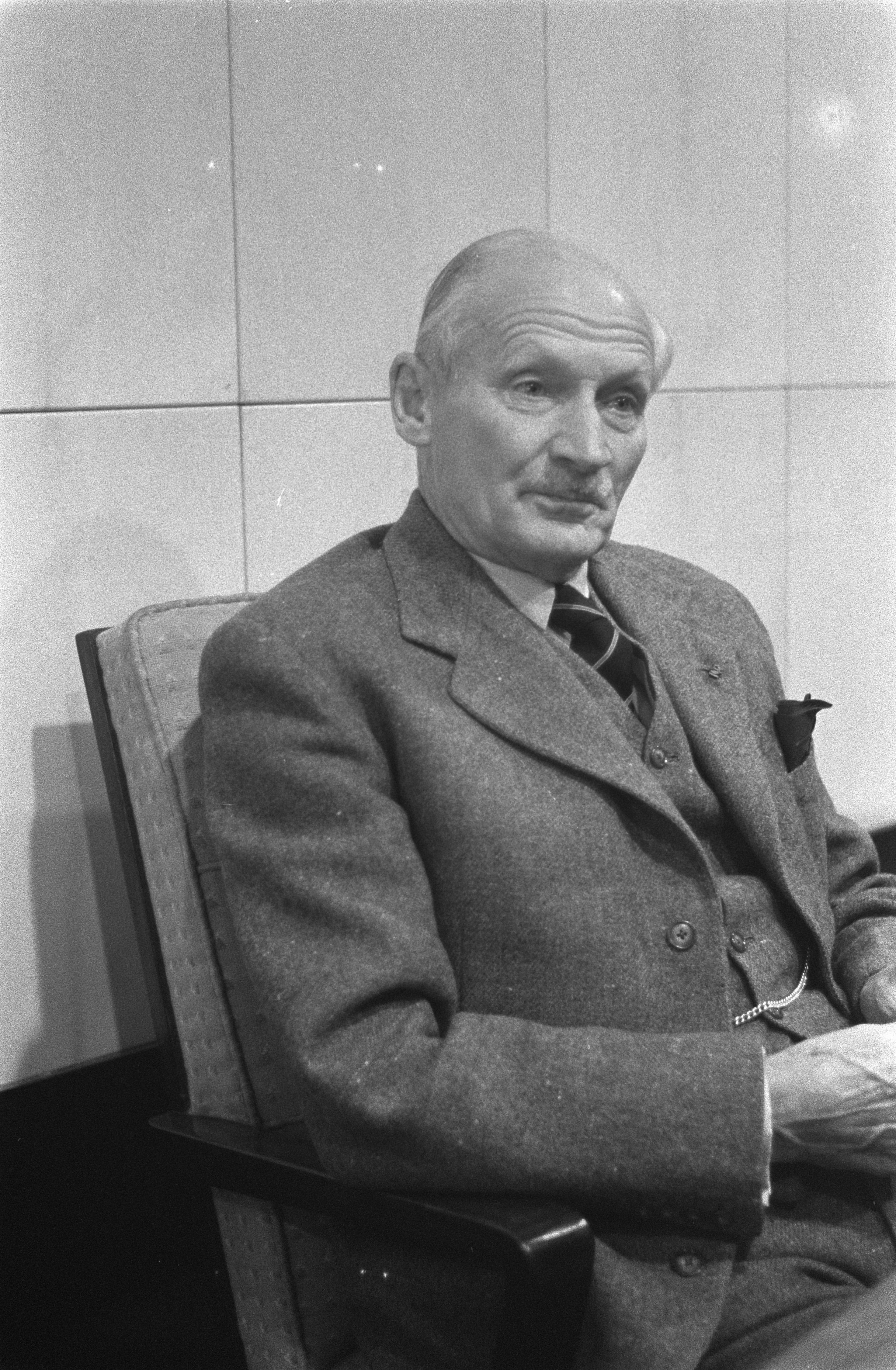 Collectie / Archief : Fotocollectie Anefo Reportage / Serie : [ onbekend ] Beschrijving : Vertrek veldmaarschalk Montgomery van Schiphol veldmaarschalk Montgomery tijdens persconferentie Datum : 10 november 1960 Locatie : Noord-Holland, Schiphol Trefwoorden : persconferenties, vertrekken Persoonsnaam : Montgomery, Bernard Fotograaf : Pot, Harry / Anefo Auteursrechthebbende : Nationaal Archief Materiaalsoort : Negatief (zwart/wit) Nummer archiefinventaris : bekijk toegang 2.24.01.05 Bestanddeelnummer : 911-7561